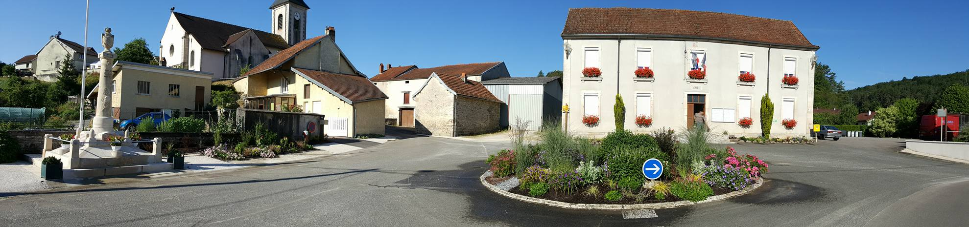 Vue panoramique de la mairie de FONCEGRIVE